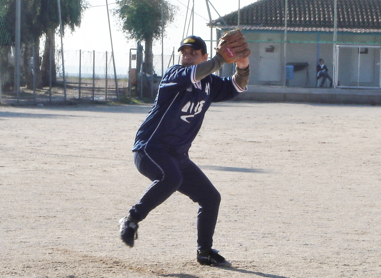 Grecce Baseball champion Dias Patras-Ainos Kefalonias 0-16 Patra Greece Ελληνικό πρωτάθλημα Μπέιζμπολ 2008 Δίας Πάτρας - Αίνος Κεφαλληνίας 0-16